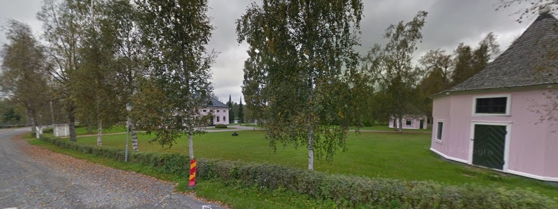 Gideå herrgård, en av de mest nordligaste herresättena i Sverige. Bruksherrgård från tidigt 1800-tal.